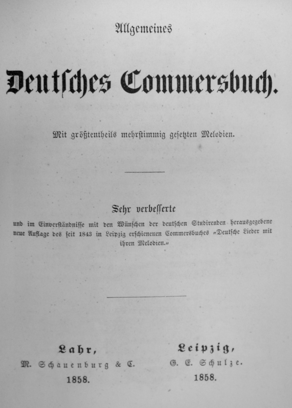 Titelblatt der Erstausgabe des Allgemeinen Deutschen Commersbuches Es wird auf den Vorläufer verwiesen, der eigentlich unter dem Titel "Deutsche Lieder nebst ihren Melodien" 1843 erschien.